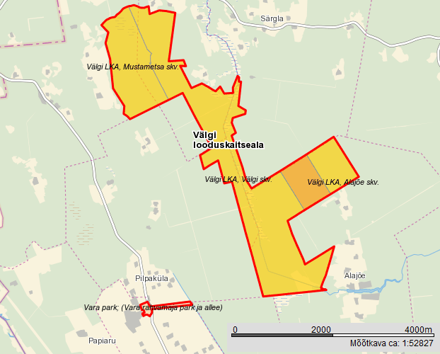 Välgi LKA kaart. Põhineb Maa-ameti kaardil.